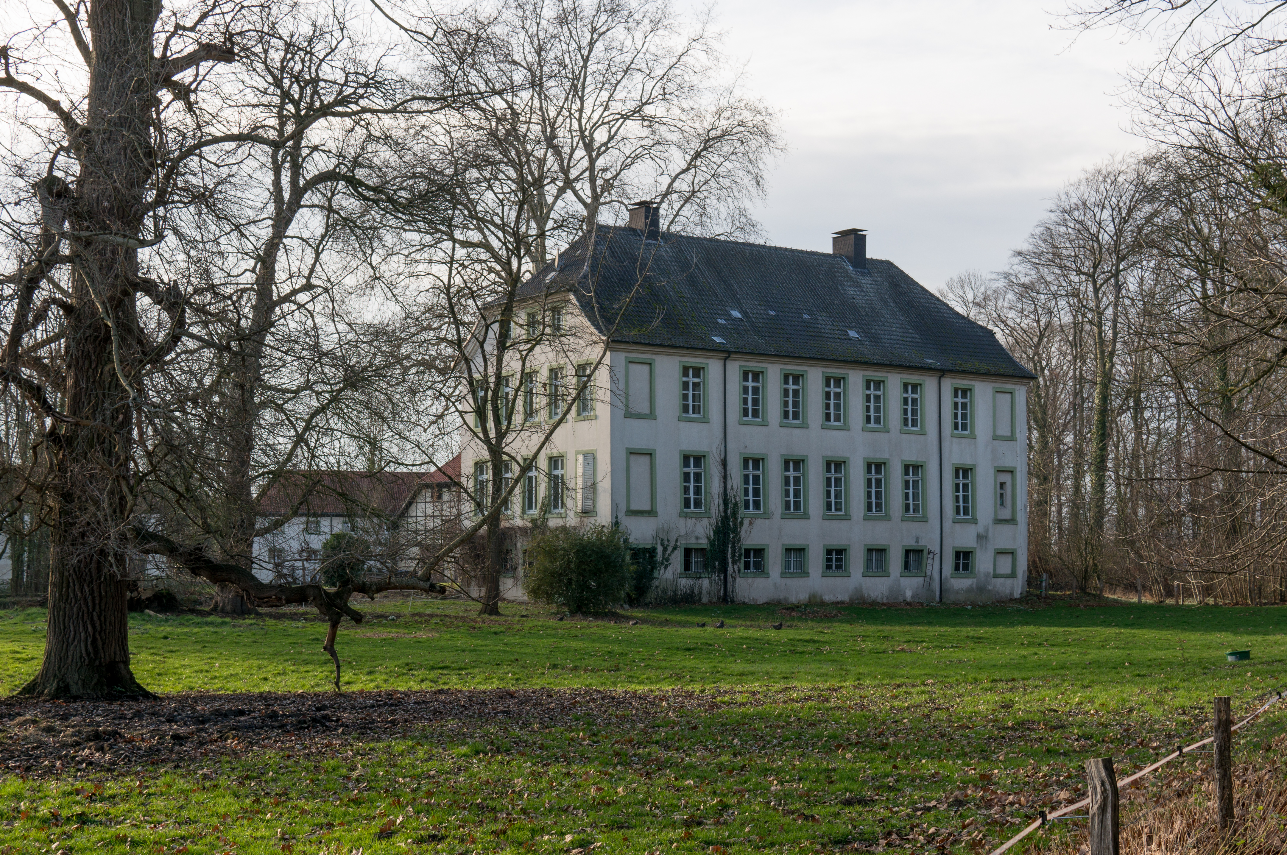 Haus Borg in Werl-Budberg, Rückseite, Blick von Osten